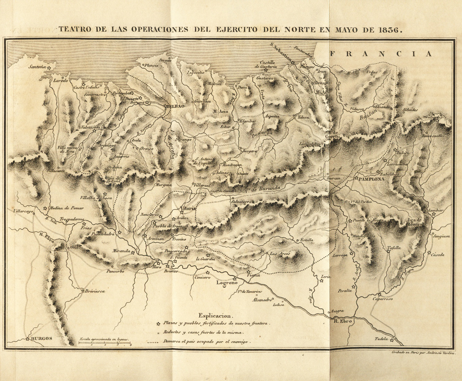 Teatro de las operacionres del ejército del Norte en Mayo de 1836. "Memoria justificativa que dirige a sus conciudadanos el general Córdova". Paris 1837